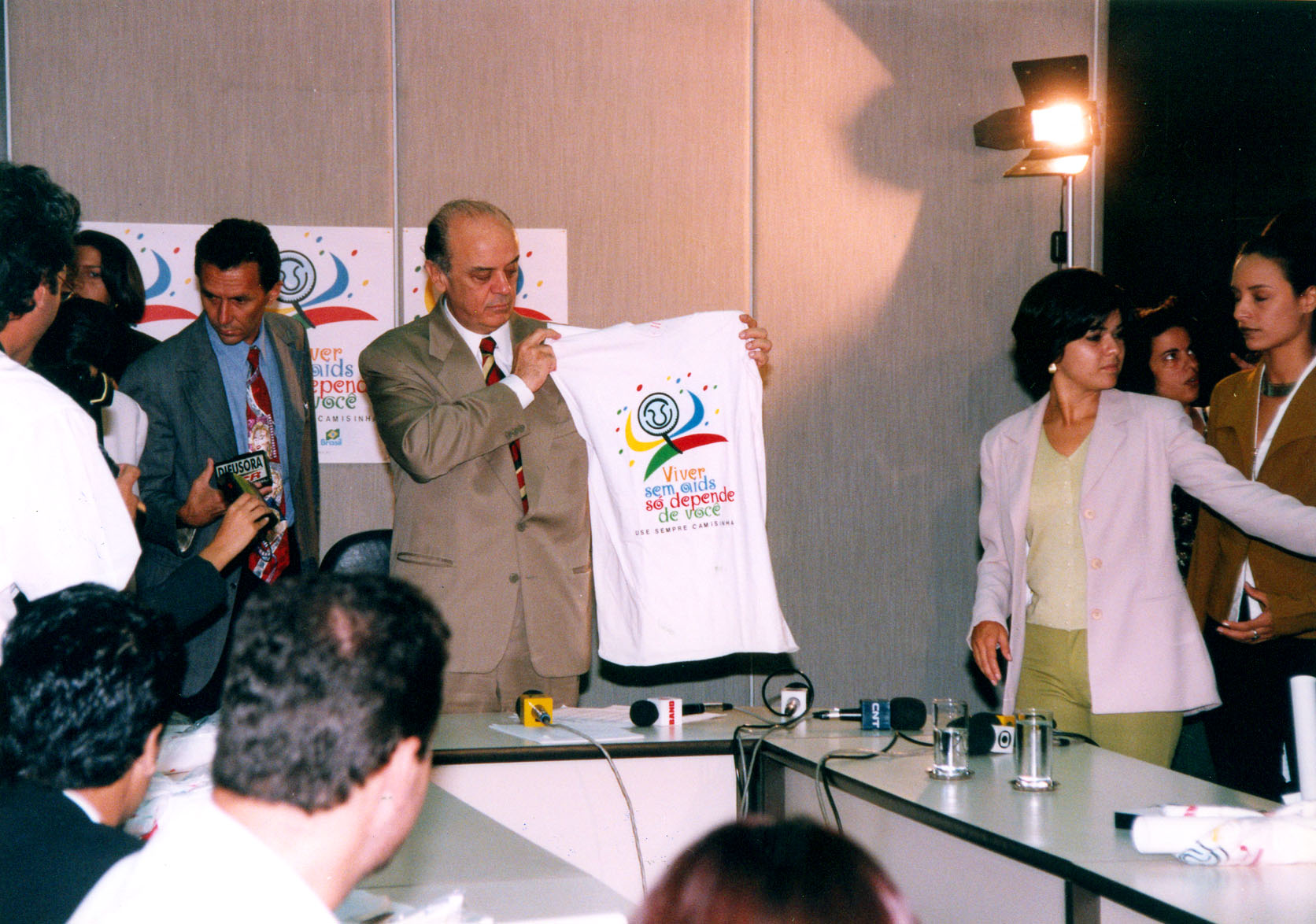 José Serra como ministro da saúde.